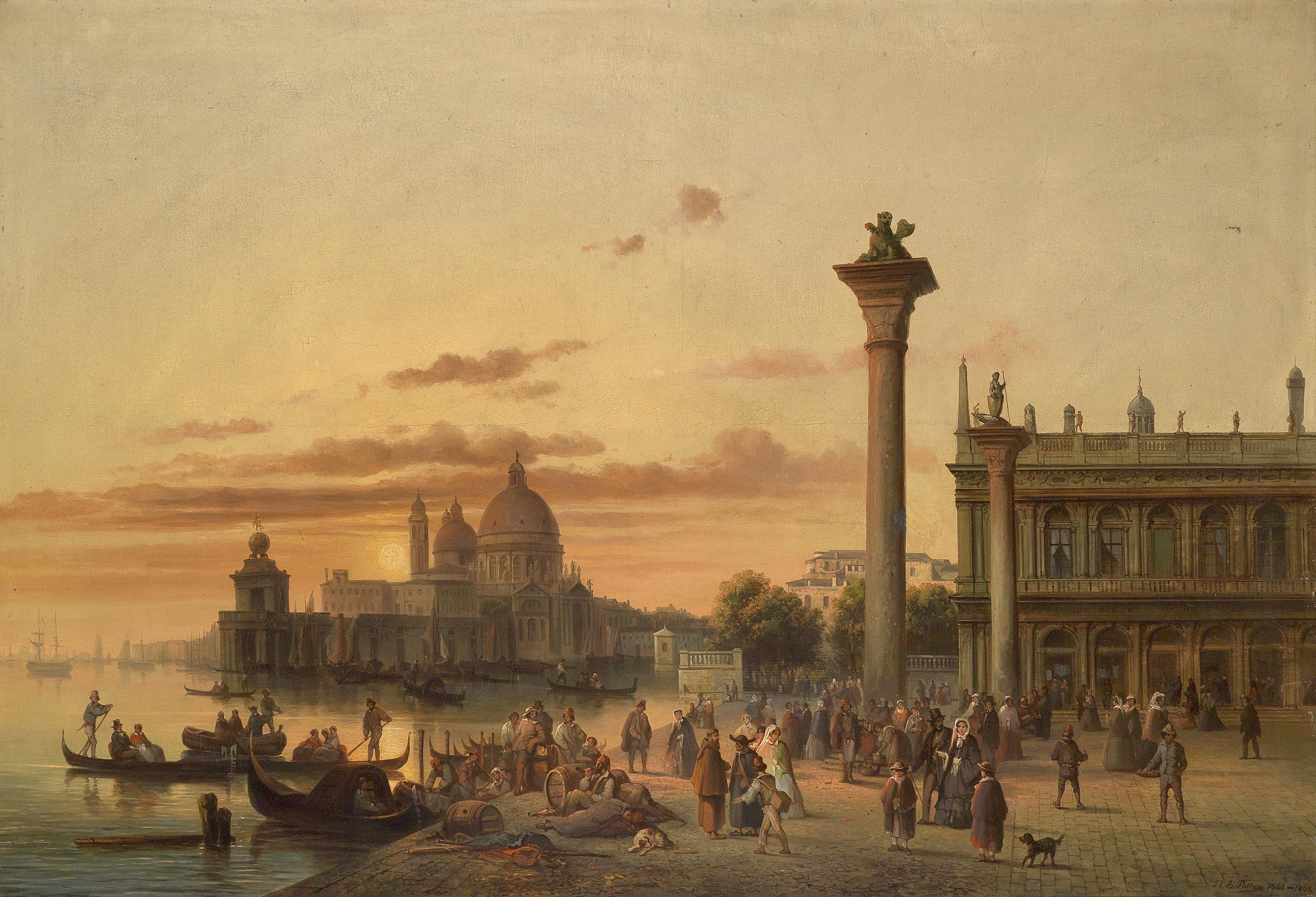 Reges Treiben am Markusplatz, Venedig mit Blick auf Punta della Dogana und Santa Maria della Salute, signiert, datiert J. C. B. Püttner 1862-1863, Öl auf Leinwand, 103 x 150 cm